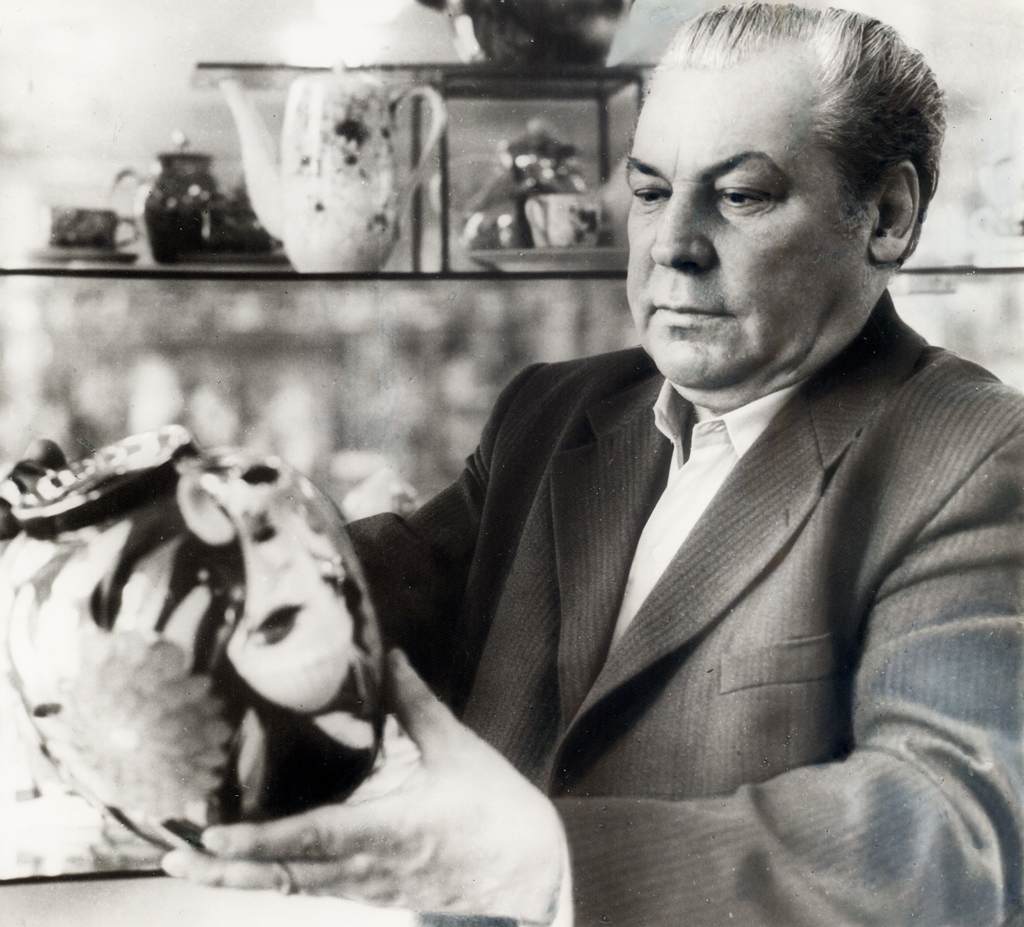 Художник-фарфорист из Ликино-Дулёво со своими работами. 1991 г.